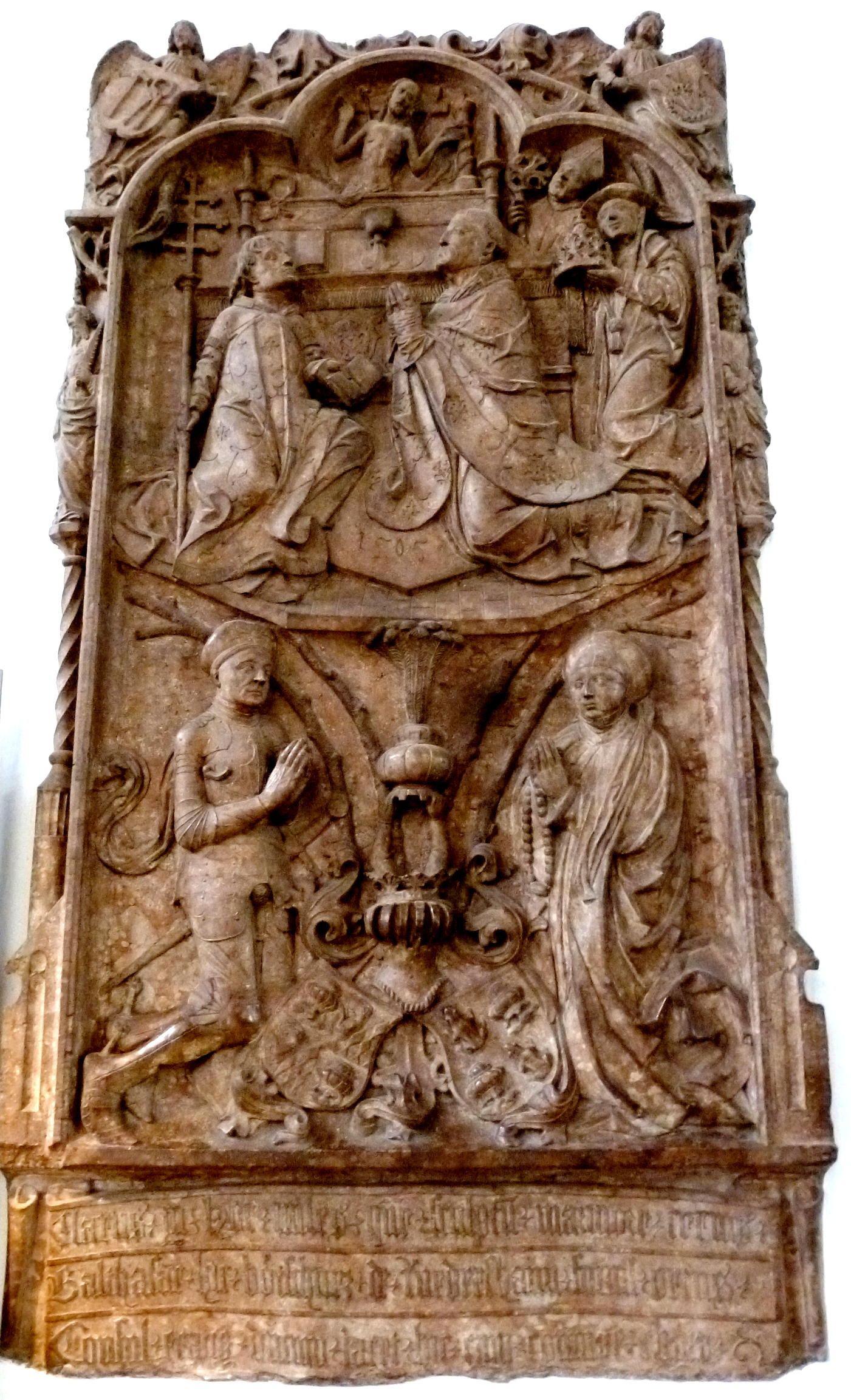 München, St. Peter, Epitaph für Balthasar Pötschner und seine Gemahlin, Rotmarmor, 255 x 136 cm